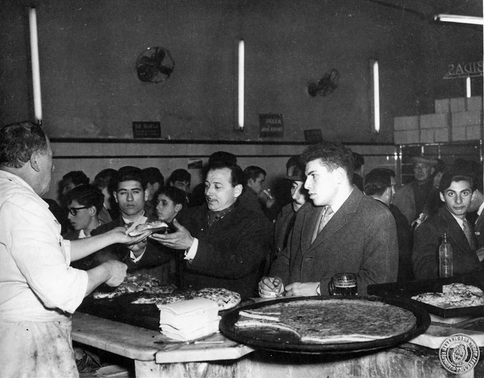 Pizzeria Las Cuartetas en calle Corrientes, Buenos Aires. Septiembre de 1958. Inventario 277606.